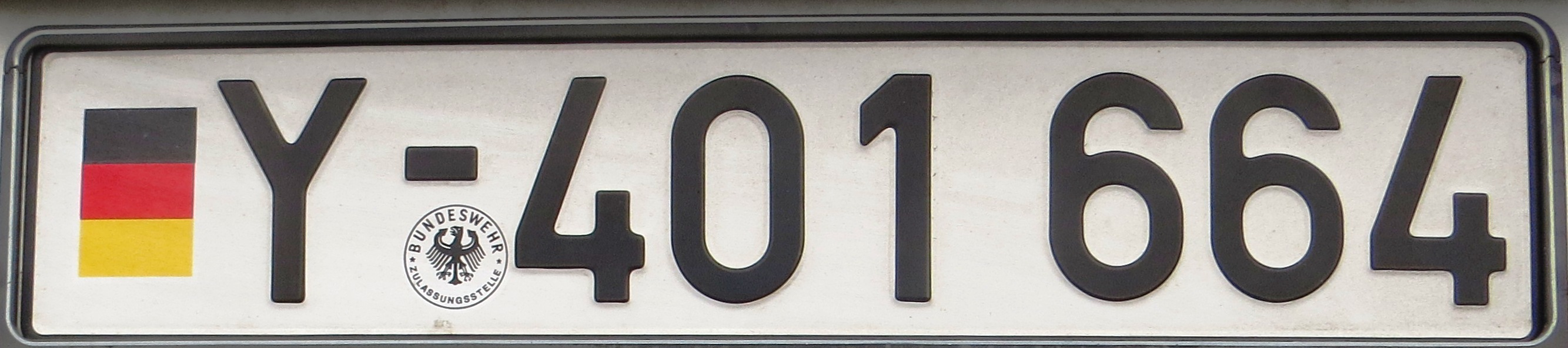 Kentekenplaat van Duitse leger